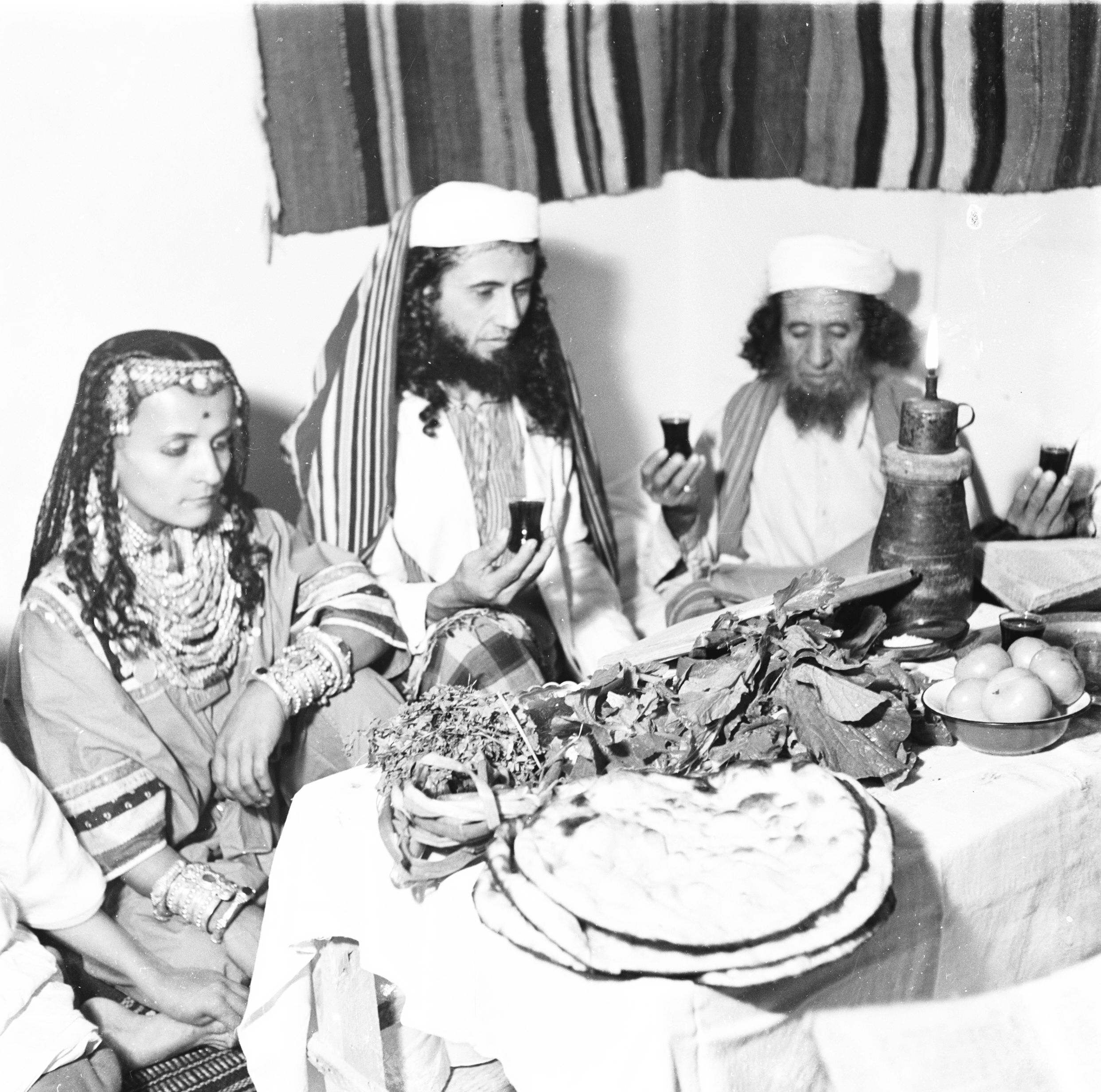 אוסף צילומים של הצלם זולטן קלוגר טווח מספרי התשלילים 26091 - 26133